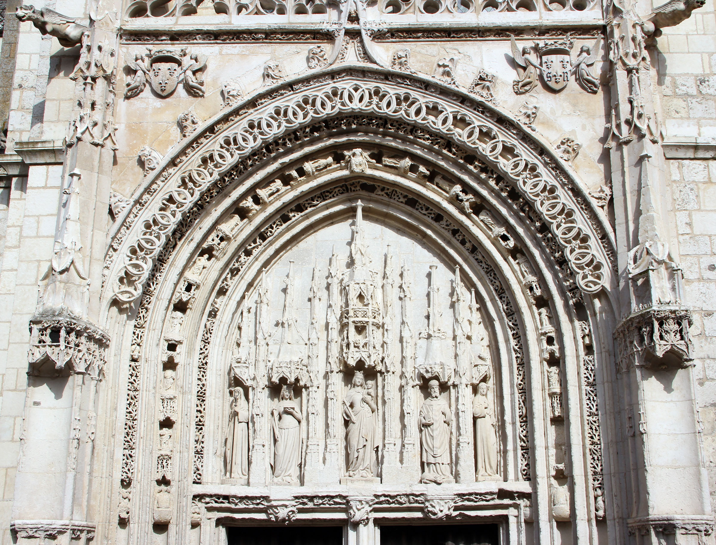 Façade de l'église Sainte-Radegonde de Poitiers. Gothique flamboyant. XVe siècle